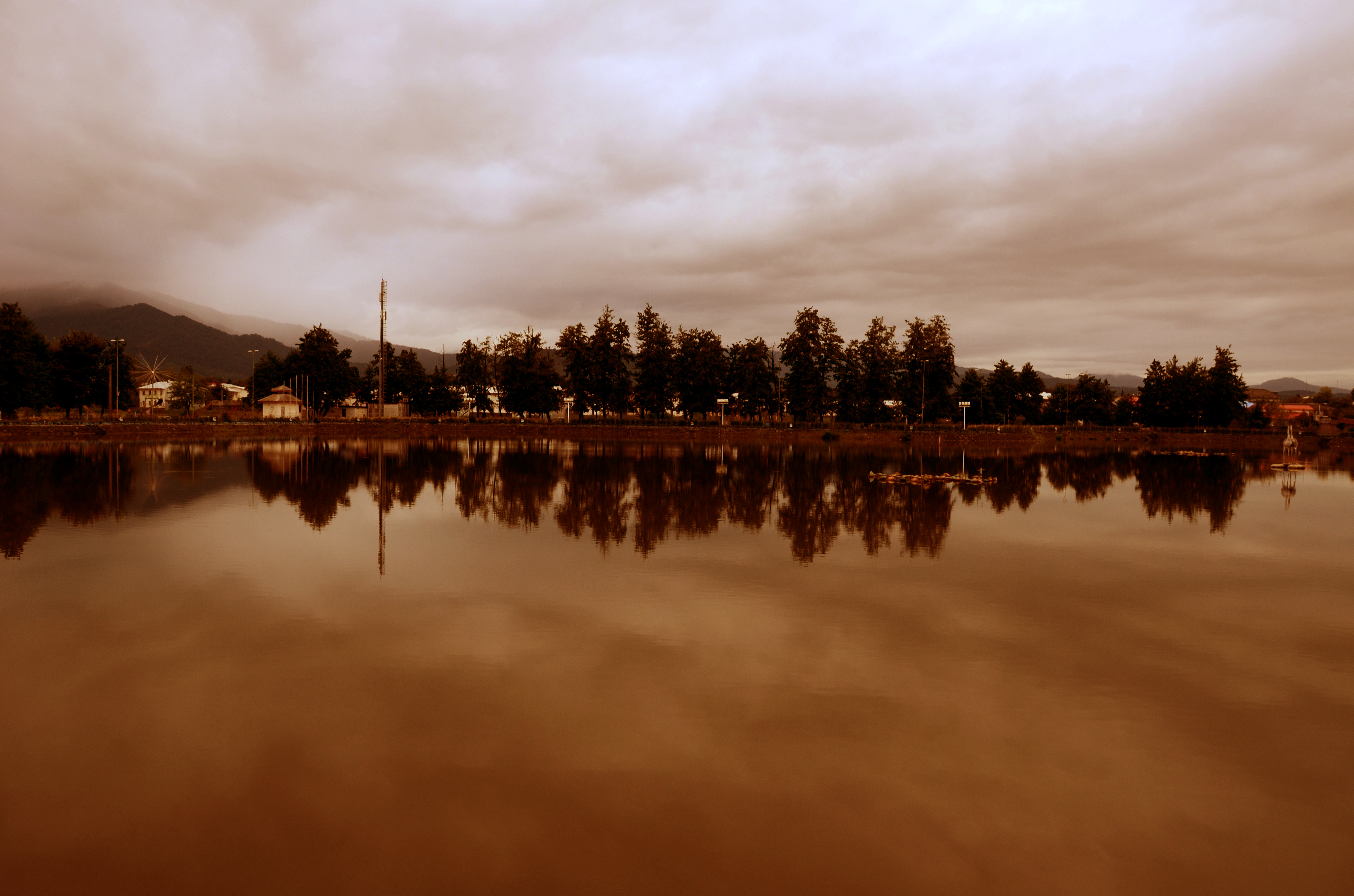 Siyahkal - Pashouran lake